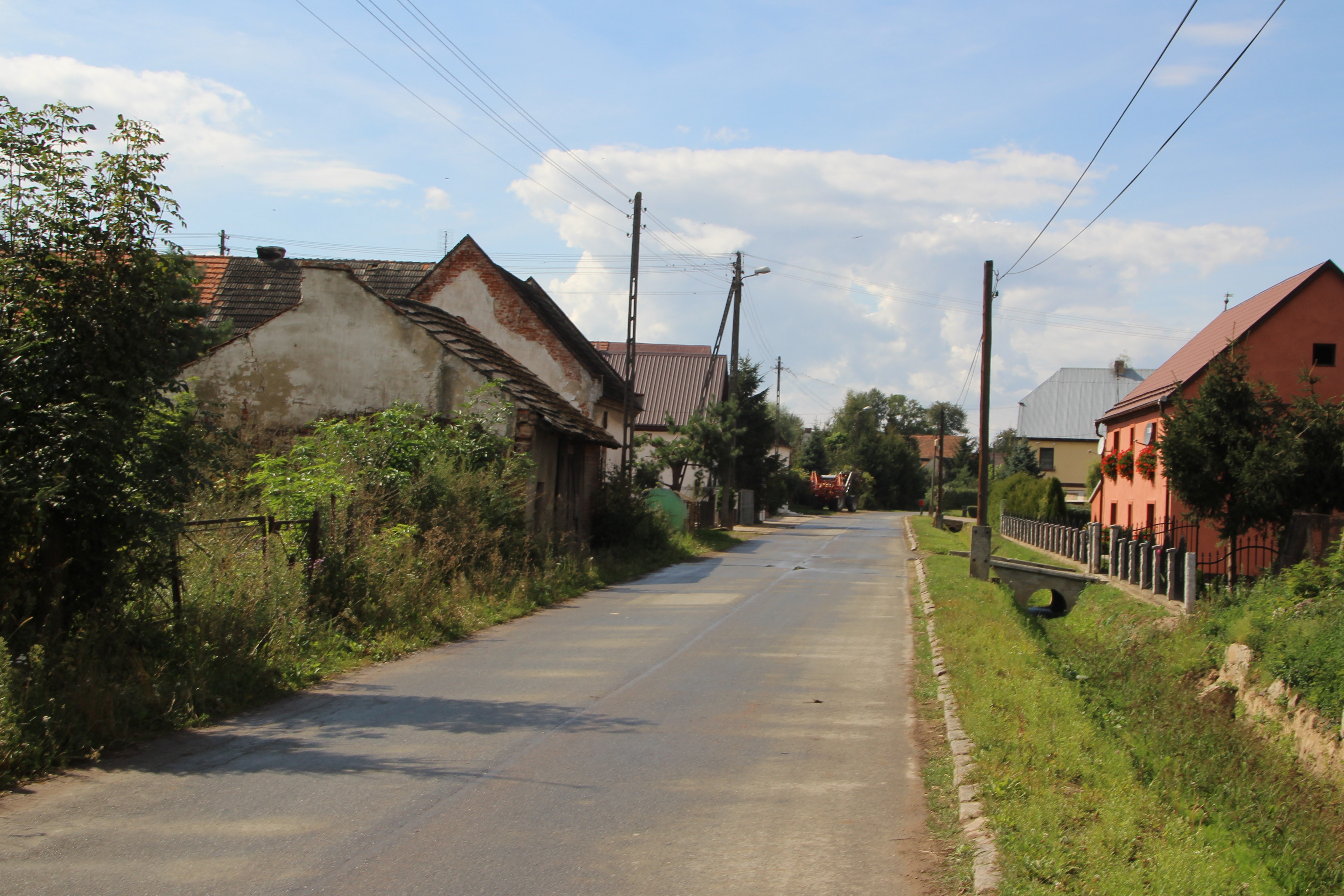 Siedlec – wieś w Polsce położona w województwie opolskim, w powiecie nyskim, w gminie Otmuchów.